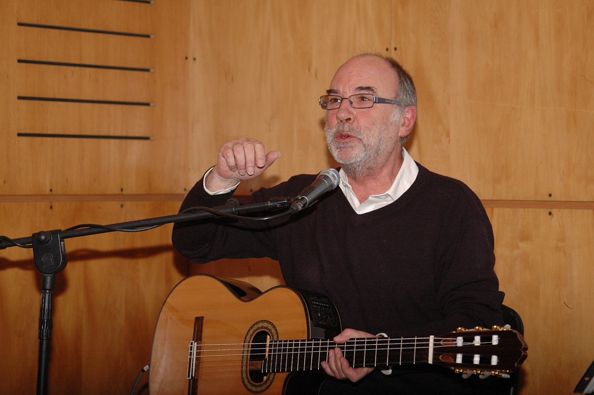 Eduardo Gatti es escritor residente de la Facultad de Letras. Con la idea de potenciar el contacto de la cultura al interior de la universidad, este cantautor nacional compartió su larga trayectoria profesional y les transmitió a los estudiantes su experiencia en el proceso creativo.